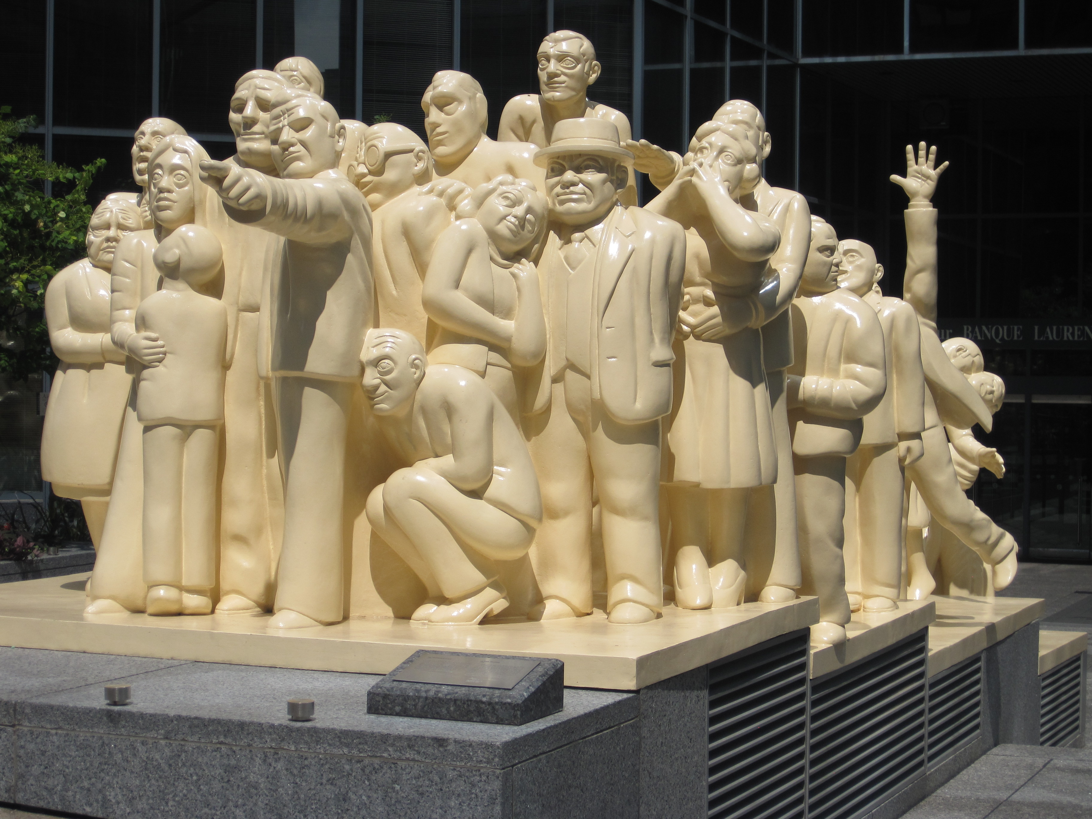 Sculpture "La Foule Illuminée" de Raymond Mason, installée sur l'Avenue McGill College à Montréal